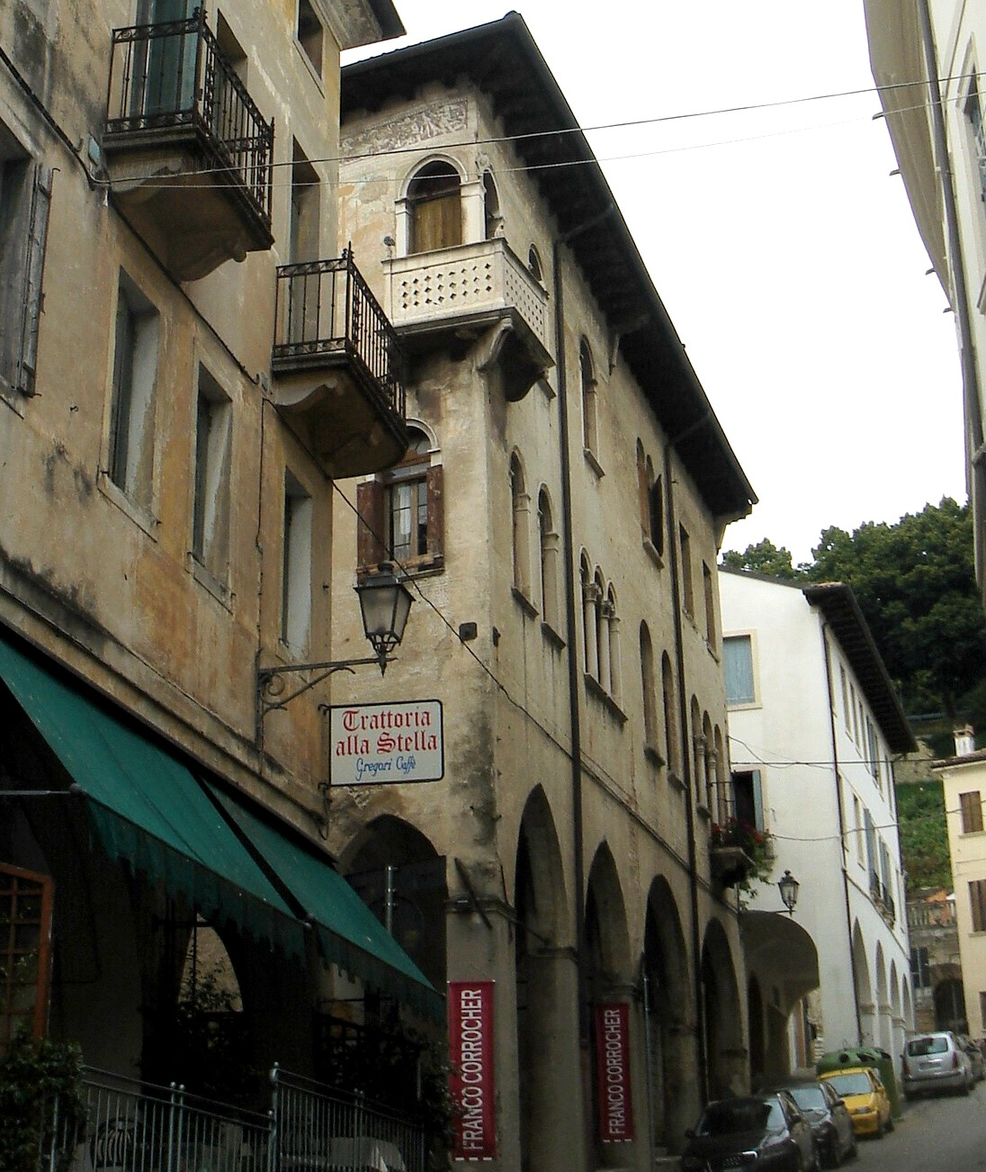 Conegliano (Treviso): Casa Sbarra (XV secolo) vista da Piazza Cima, con la caratteristica terrazzetta ad angolo dell'ultimo piano e gli affreschi rinascimentali.